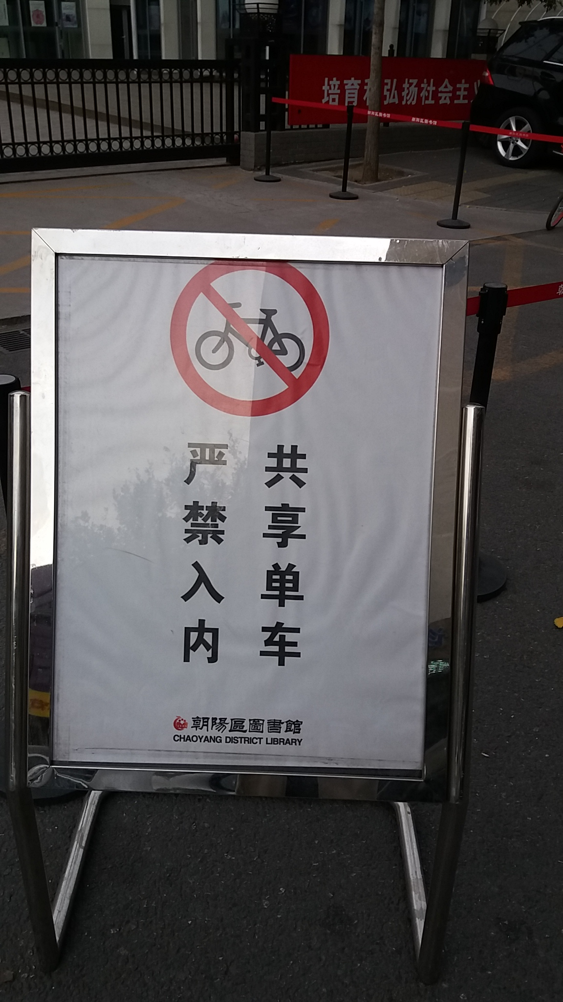 北京朝阳区图书馆提醒您：共享单车，严禁入内。